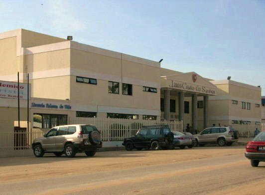 Igreja Universal do Reino de Deus, em Morro Bento